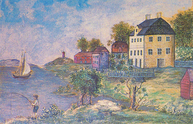 Lars Fresks första fabriksbyggnad på Elfviks gård uppförd 1798. Teckning från 1799.